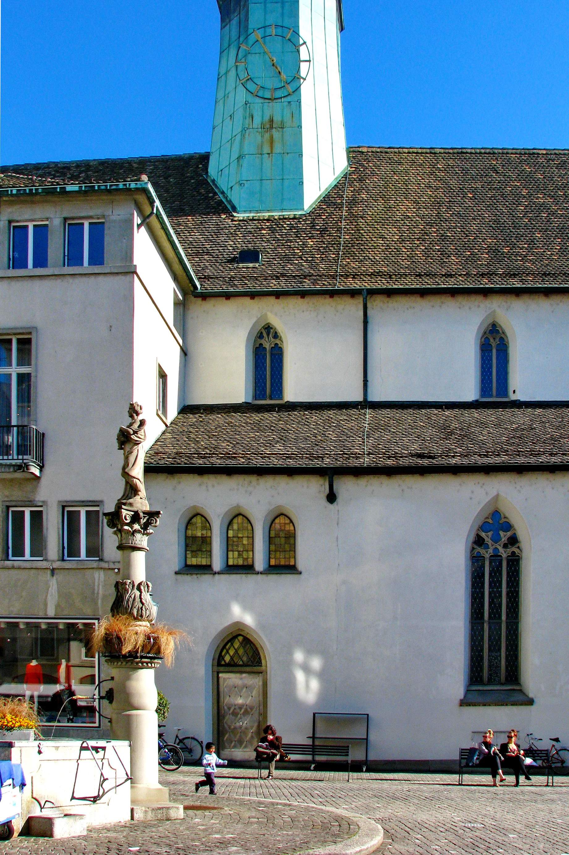 Augustinerkirche at Münzplatz in Lindenhof quarter in Zürich (Switzerland), as seen from Augustinergasse.